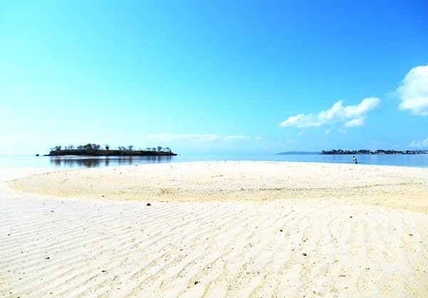 Gili pasir adalah sebuah pulau kecil tak berpenghuni di Tanjung Luar, Desa Keruak, Kab. Lombok Timur NTB. Gili ini tak berpenghuni, dan hanya terlihat ketika air laut surut.